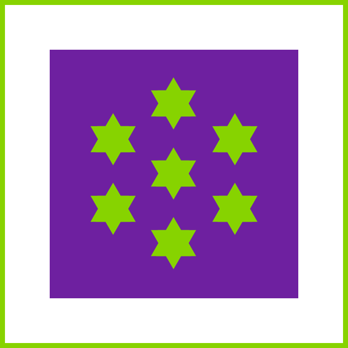 Antigua bandera de la comarca española del Campo de Gibraltar. Usada hasta 2016